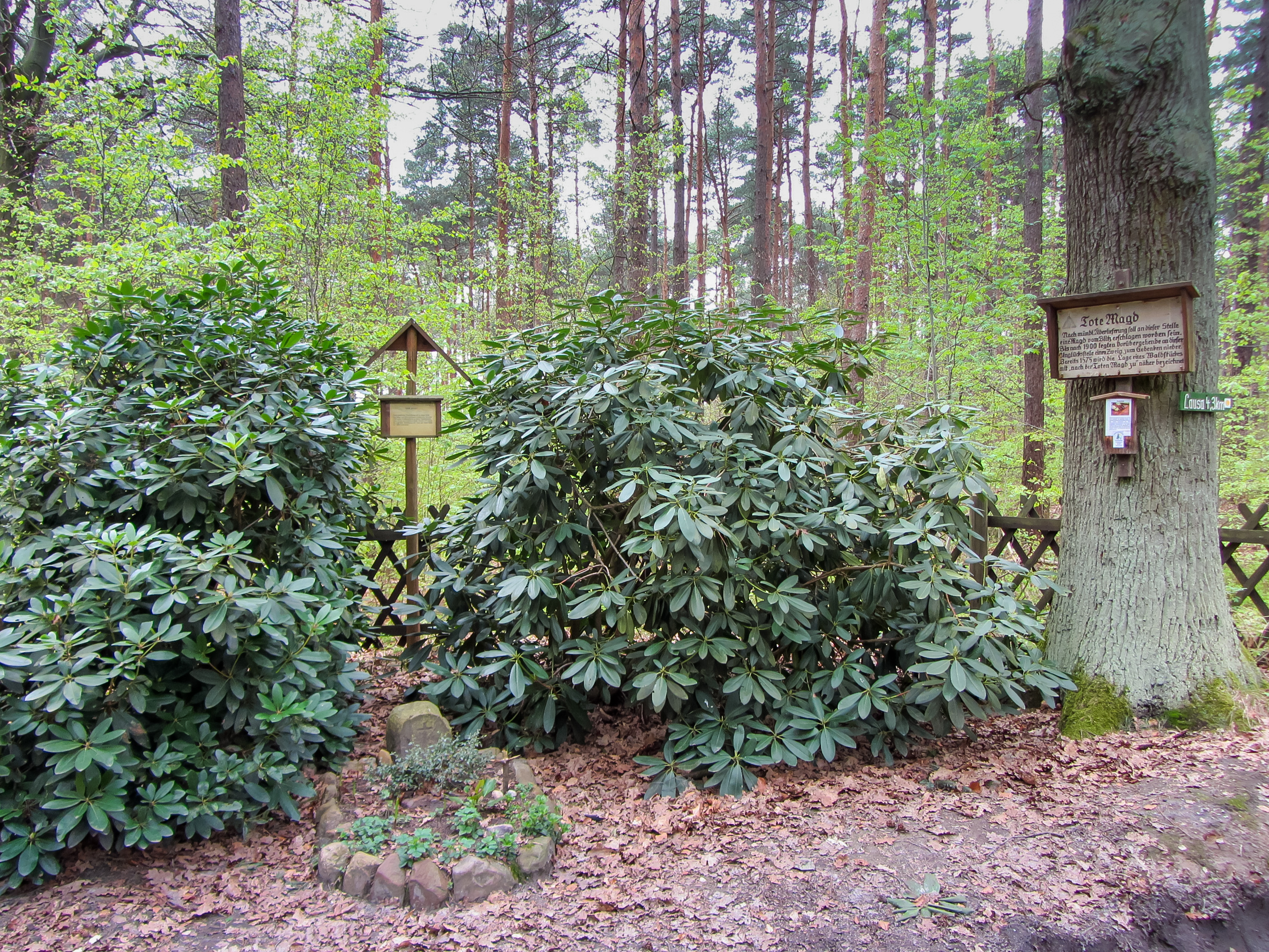 Kreuzstein Tote Magd bei Dahlen Stdt. Schmannewitz